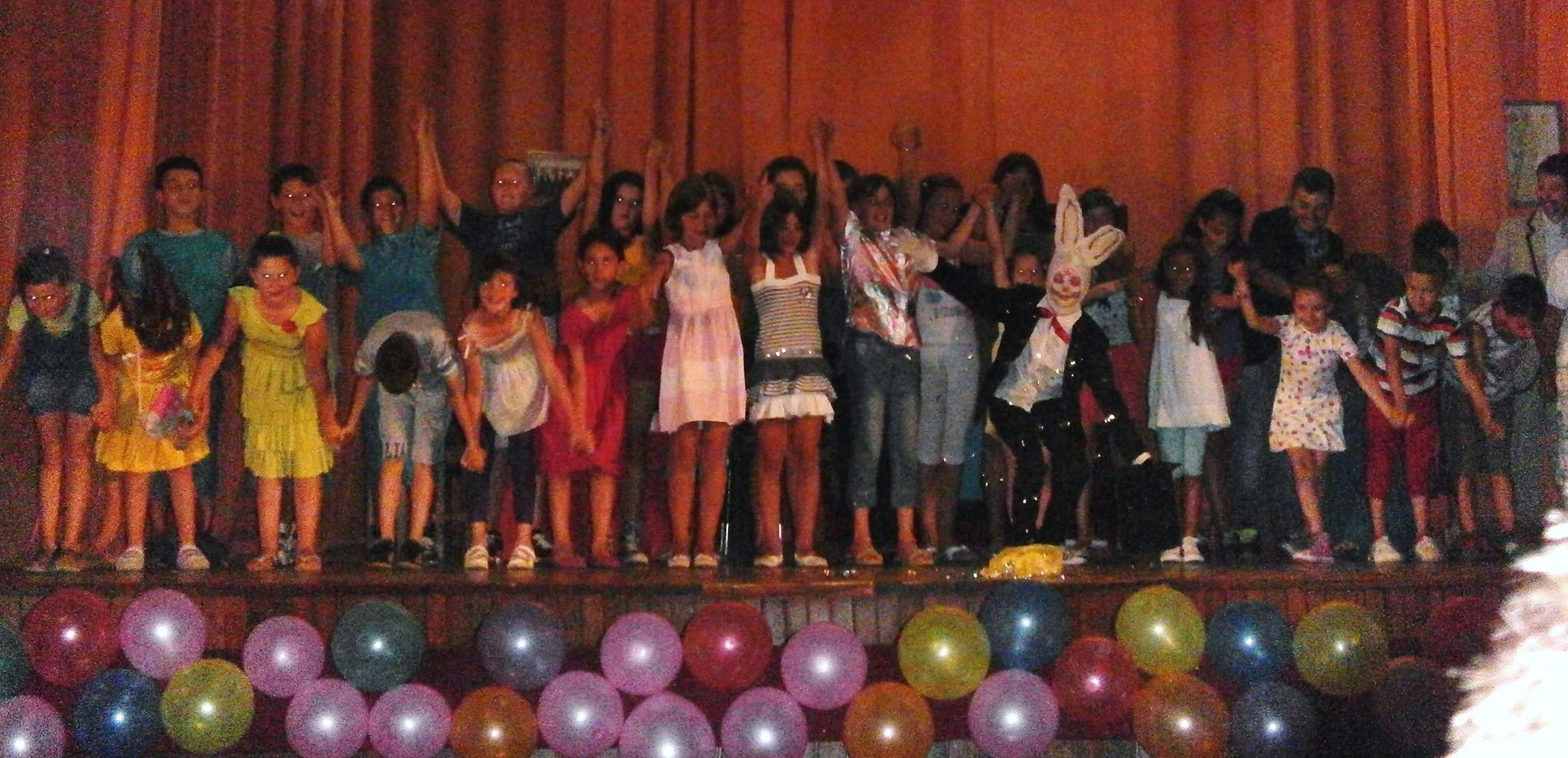 Српски (ћирилица): Драмски студио "Просвјета", Вишеград